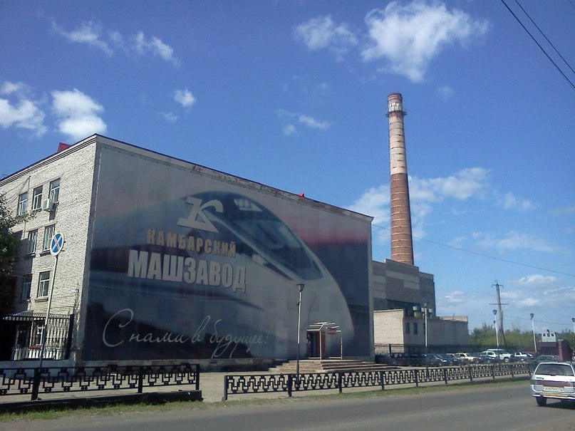 Камбарский машзавод